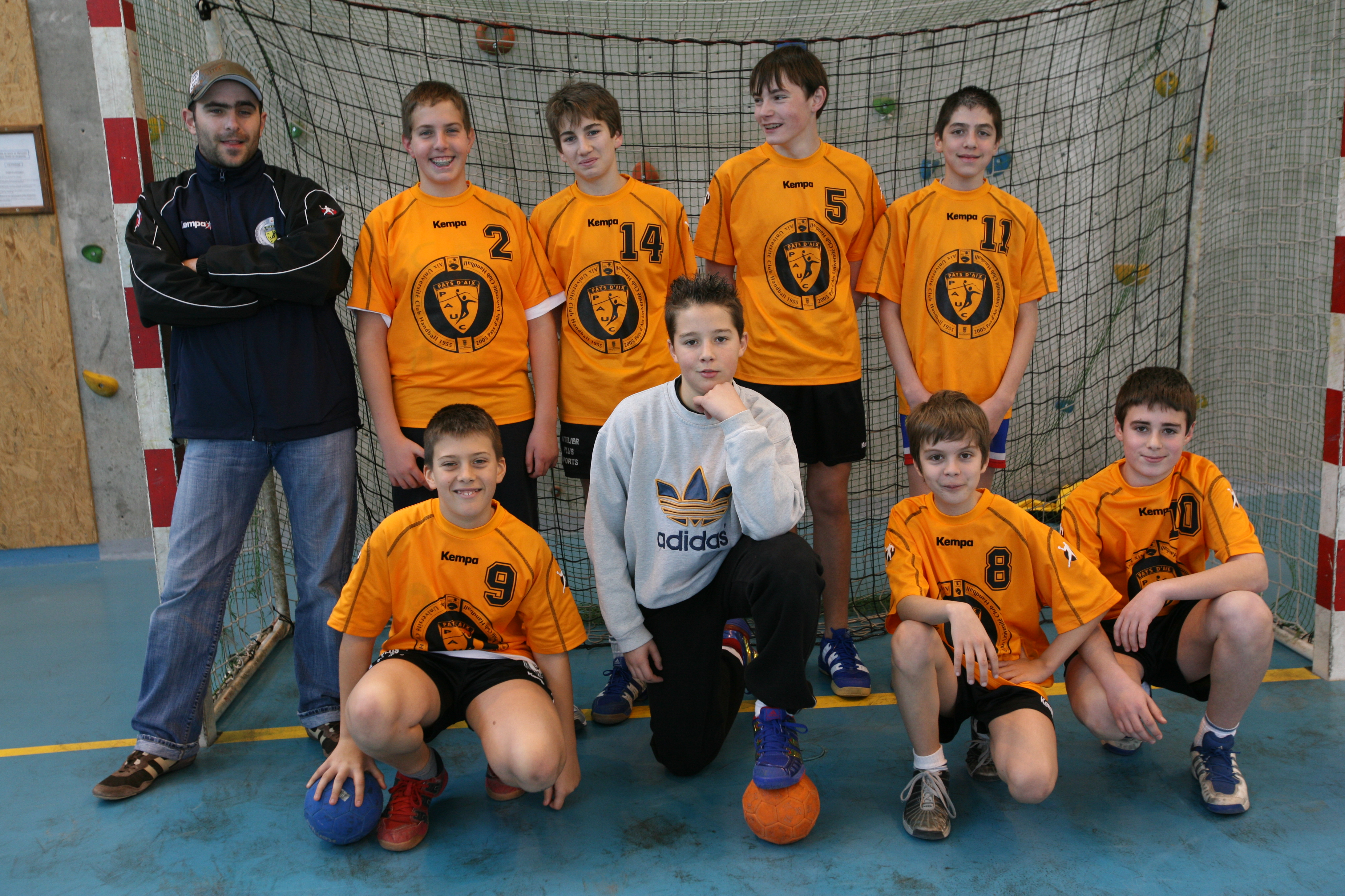 Aix-en-Provence, Handball, Compétition scolaire Photo personnelle prise en février 2006 Auteur : Oscar J. Marianez